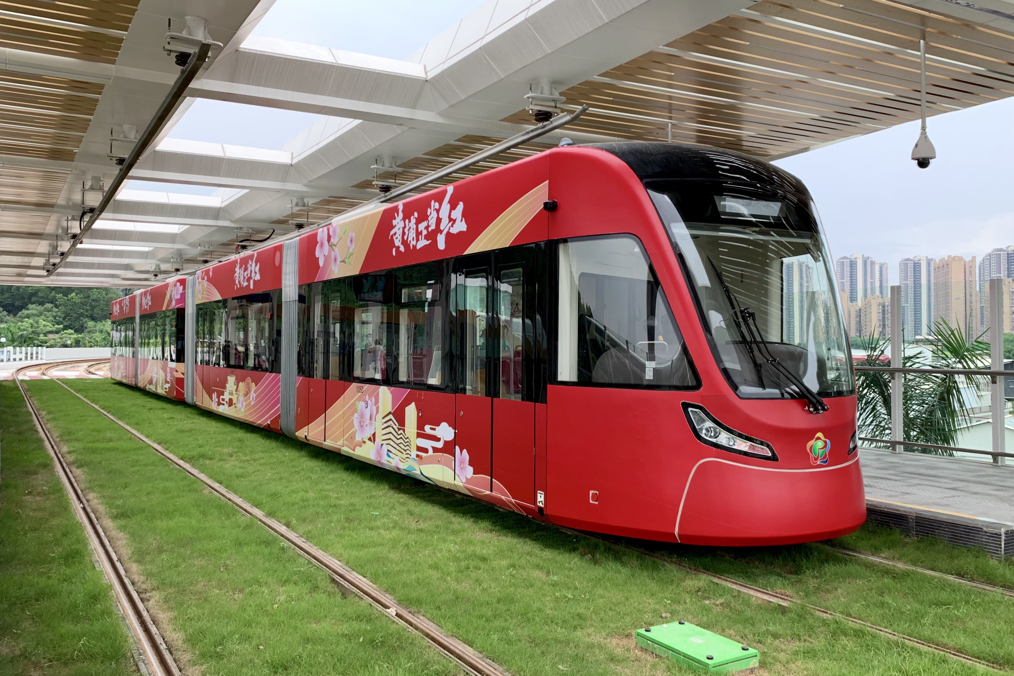 黄埔有轨电车1号线首班开出的电车